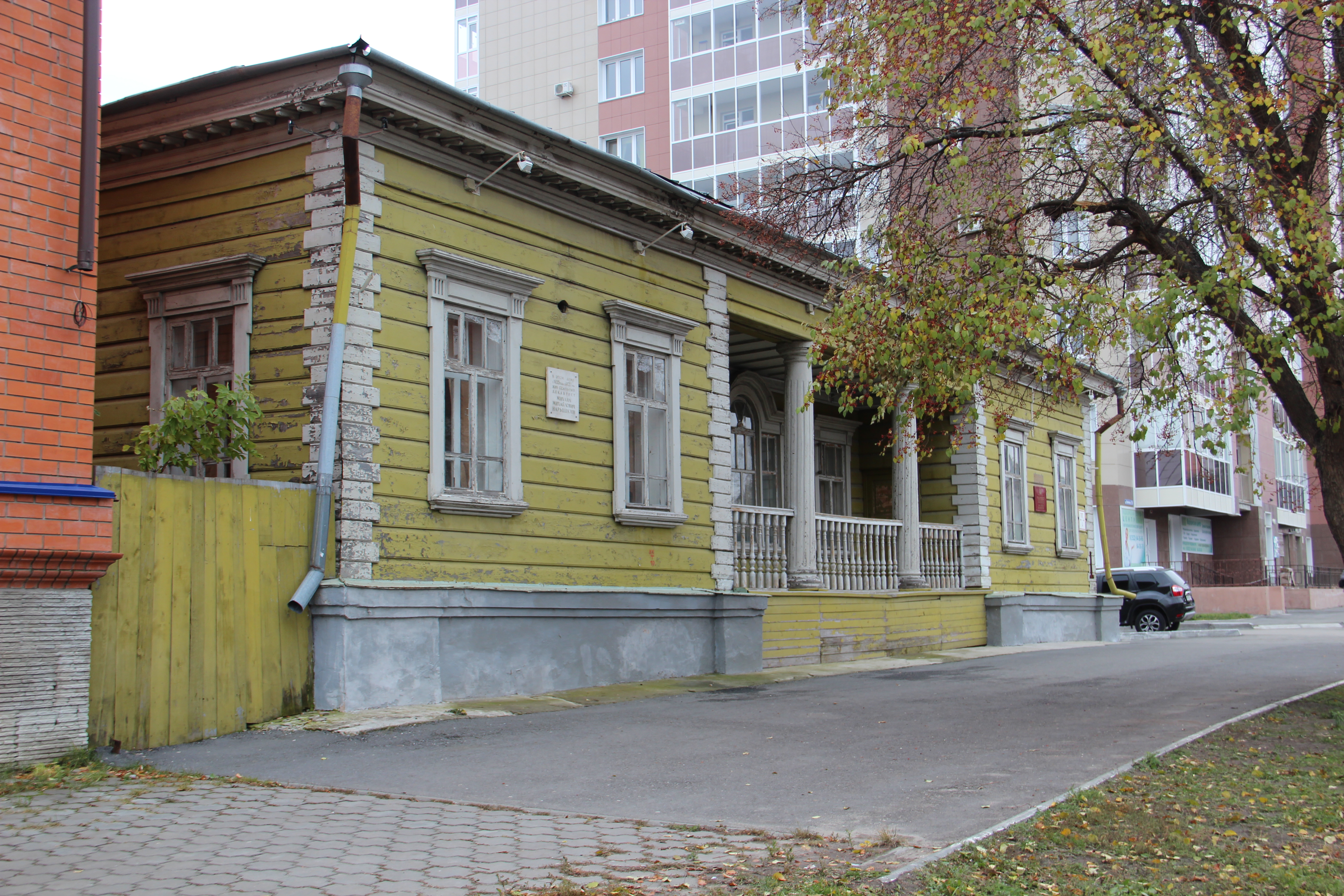 Дом декабриста М.М. Нарышкина (Курганская область, Курган, улица Климова, 80а)